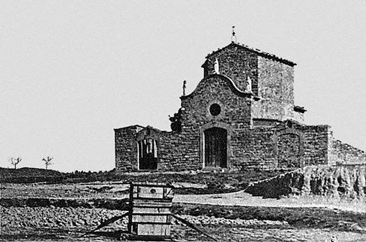 És una foto del que havia sigut la església de Santa Úrsula de Santpedor